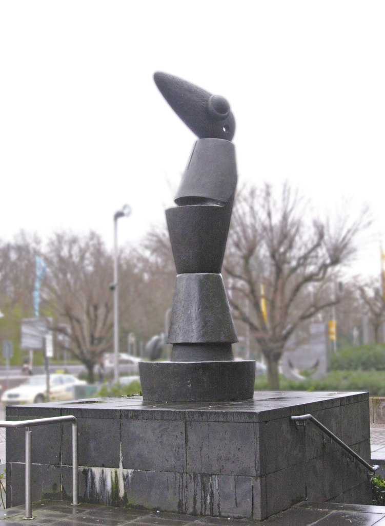 Max Ernst, Habakuk (Nach einem Modell von 1934, Stiftung Wilhelm Hack, Köln, Kunstverein für die Reinlande und Westfalen, Dauerleihgabe an die Stadt Düsseldorf) Url